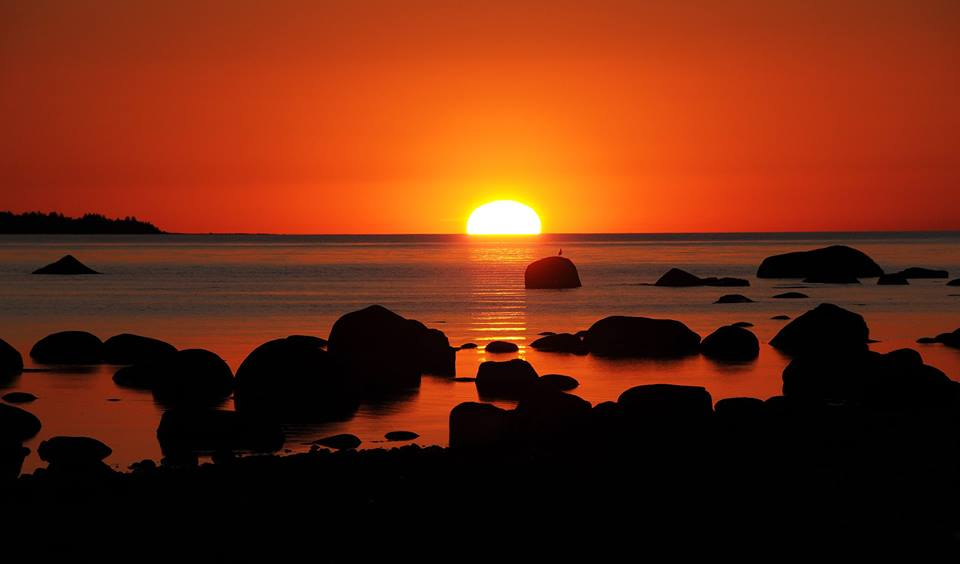 Mere värvid